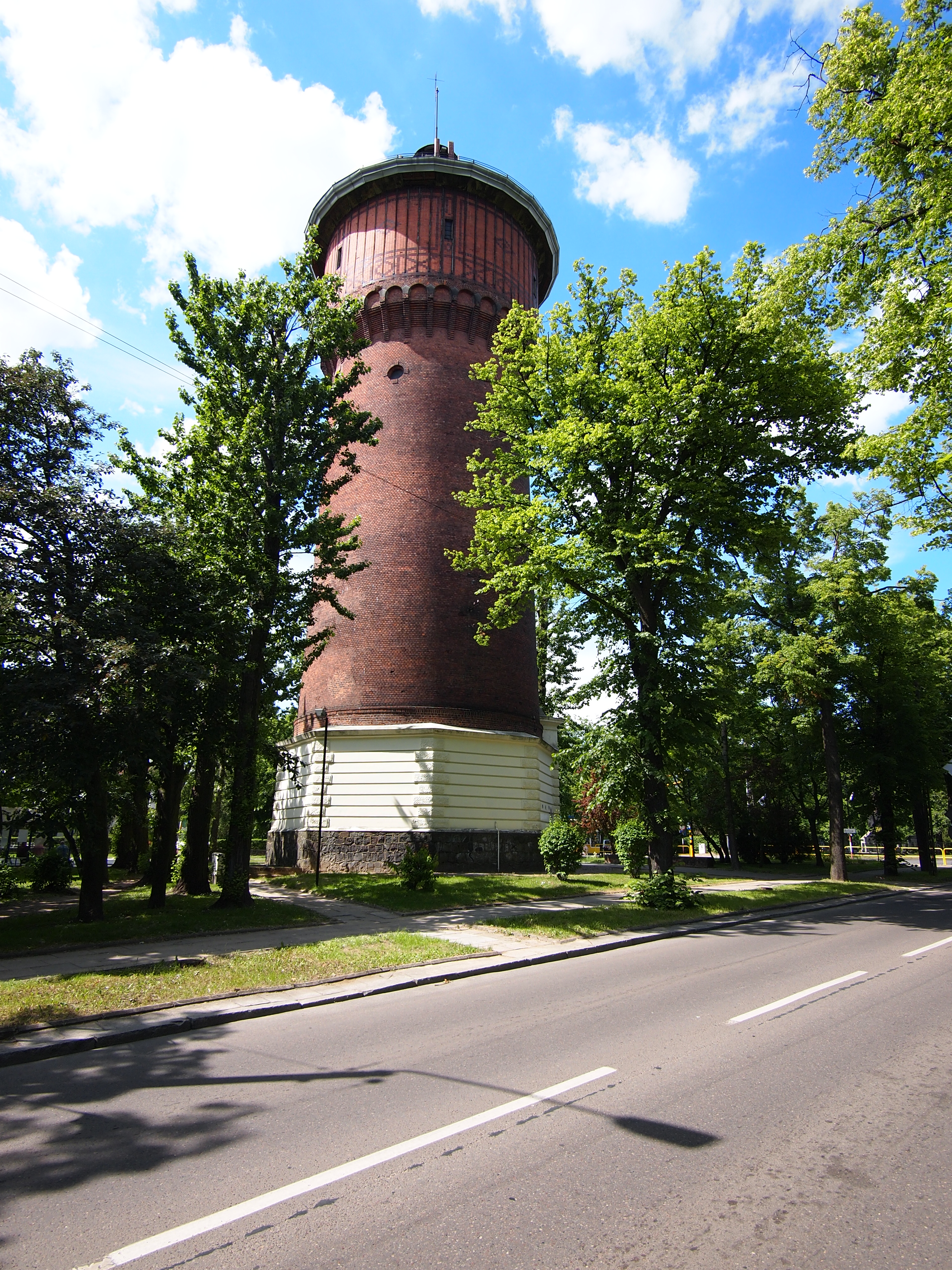 Tczew, ul. Bałdowska 1 - 40-metrowa miejska wieża ciśnień z 1905 r.